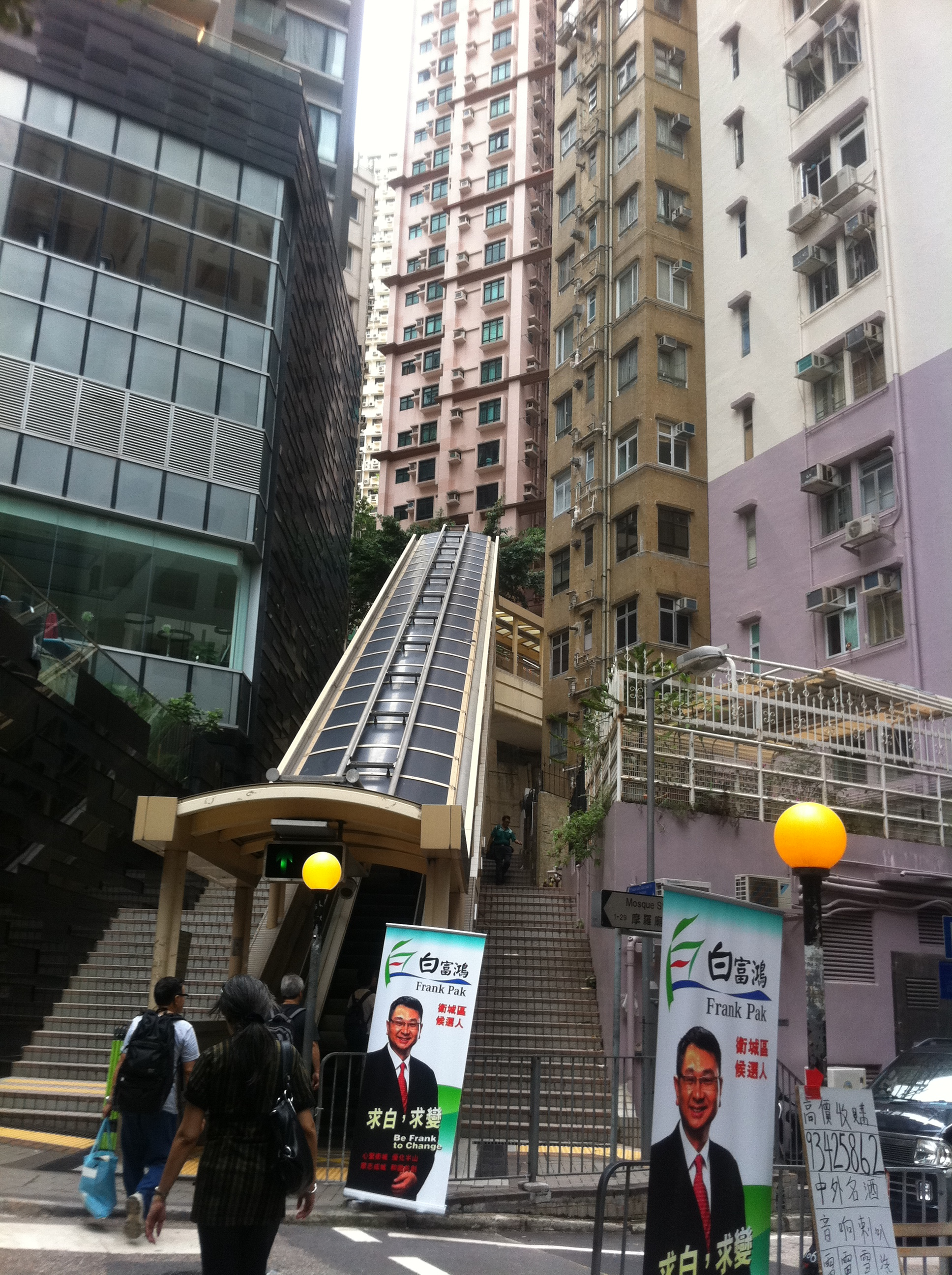 中文（香港）: 西半山行人電梯